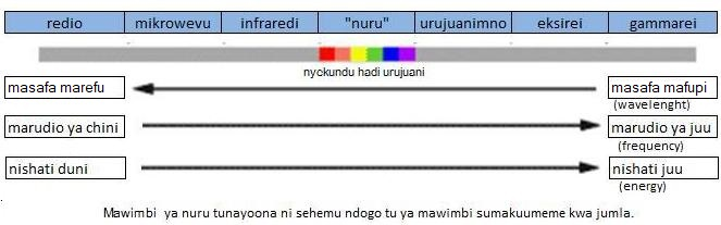 Kiswahili: nuru katia spektra ya mnururisho sumakuumeme (nyembamba kidogo)